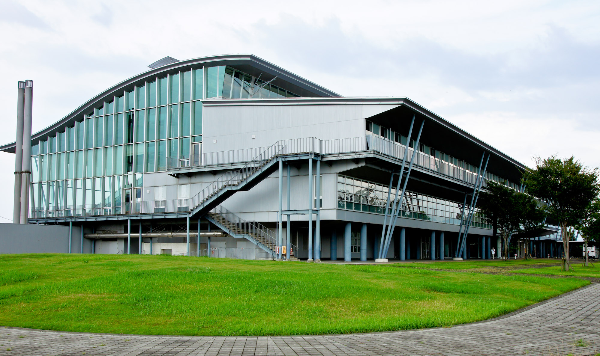 熊本県運転免許センター 西側より撮影